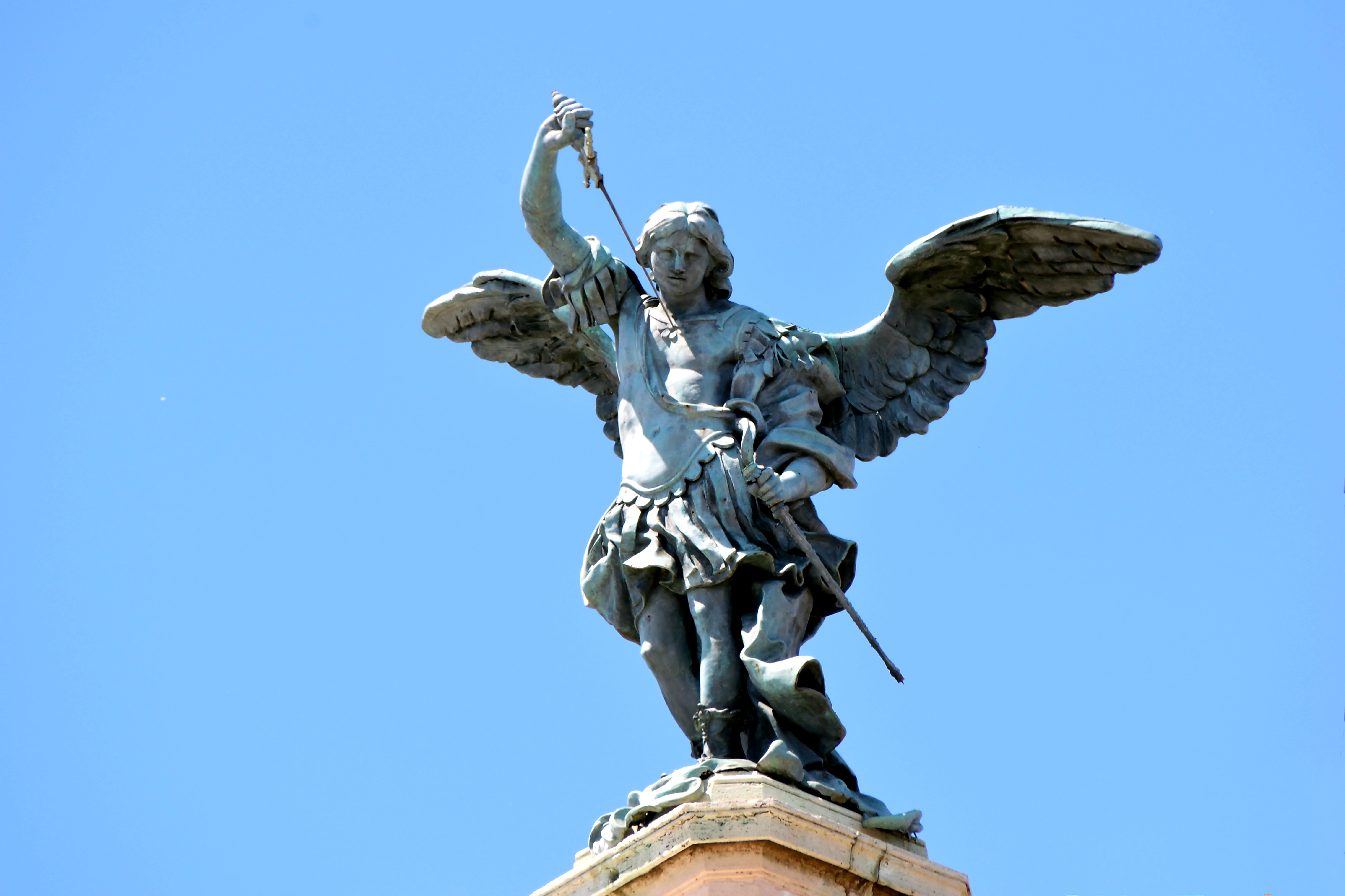 Detailaufnahme von der Statue des Erzengels Michael auf der Engelsburg